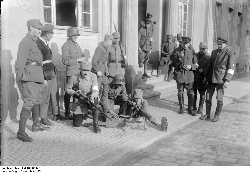 Bewaffnete bayerische Kampfverbände der Truppe "Hitler" an der Thüringschen Grenze. Hakenkreuzler halten in den Strassen Neustadt`s mit Maschinengewehren Wache.